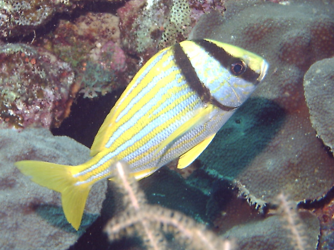 Burro Catalina. Anisotremus virginicus. Ene-2004. Parque Nacional Morrocoy. Tucacas. Venezuela